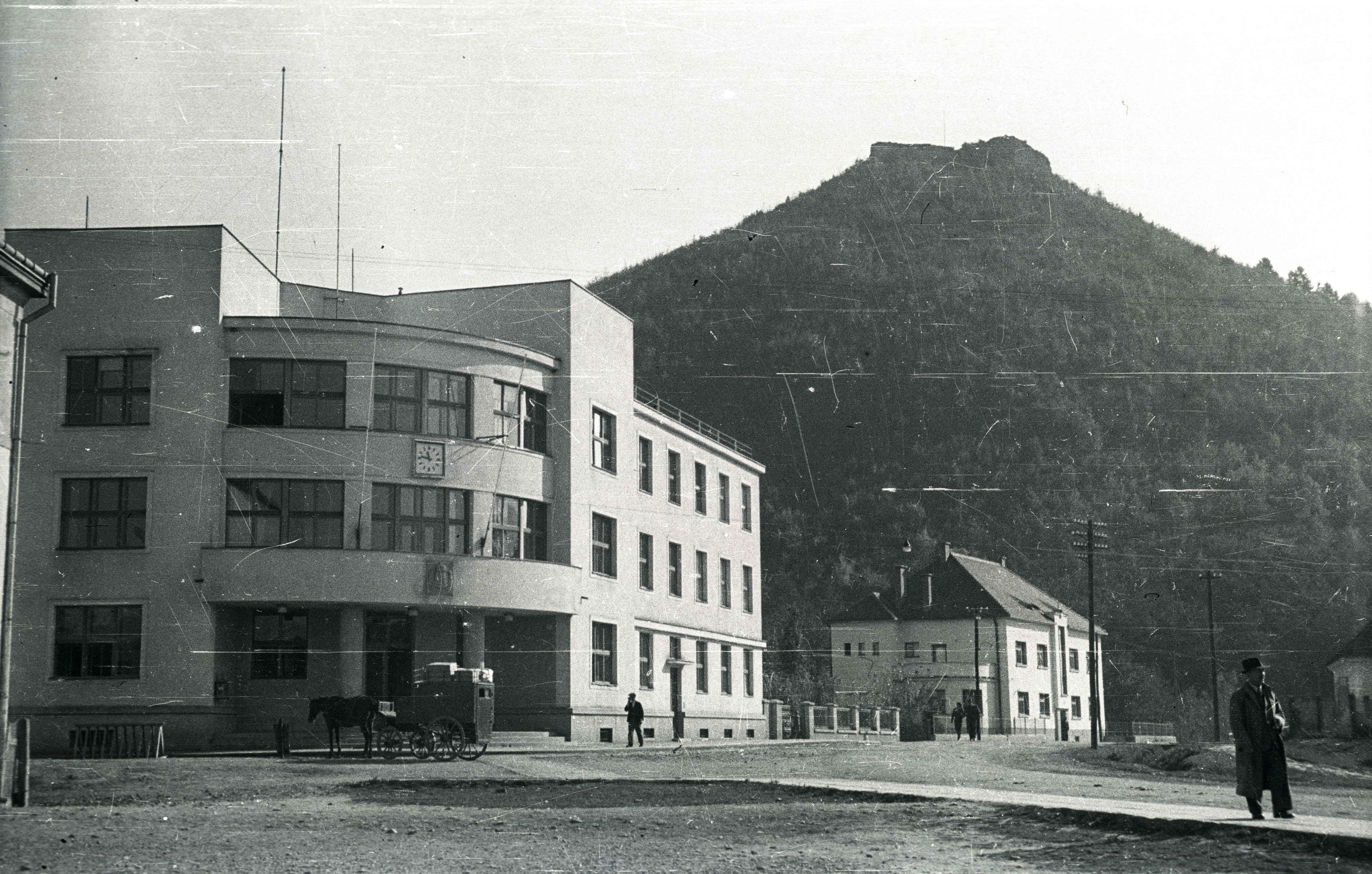 Ivan Franko utca, balra a Szolgabírósági palota, háttérben a vár. Location: Ukraine, Khust Tags: horse, watch, mountain, postal vehicle, Transcarpathia, street view, castle ruins Title: Ivan Franko utca, balra a Szolgabírósági palota, háttérben a vár.